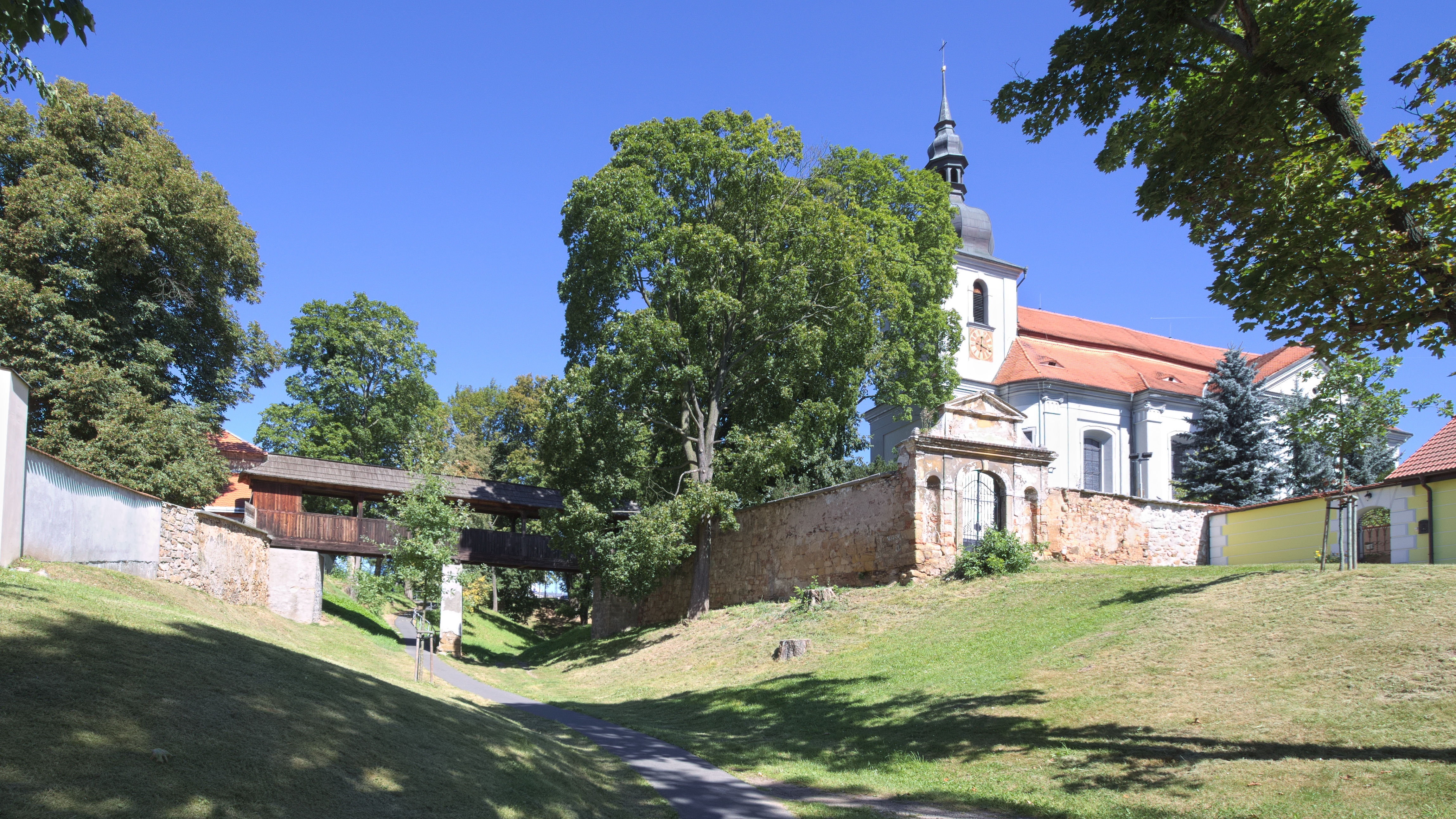 Vejprnice, Kirche des hl. Vojtěch und Holzbrücke